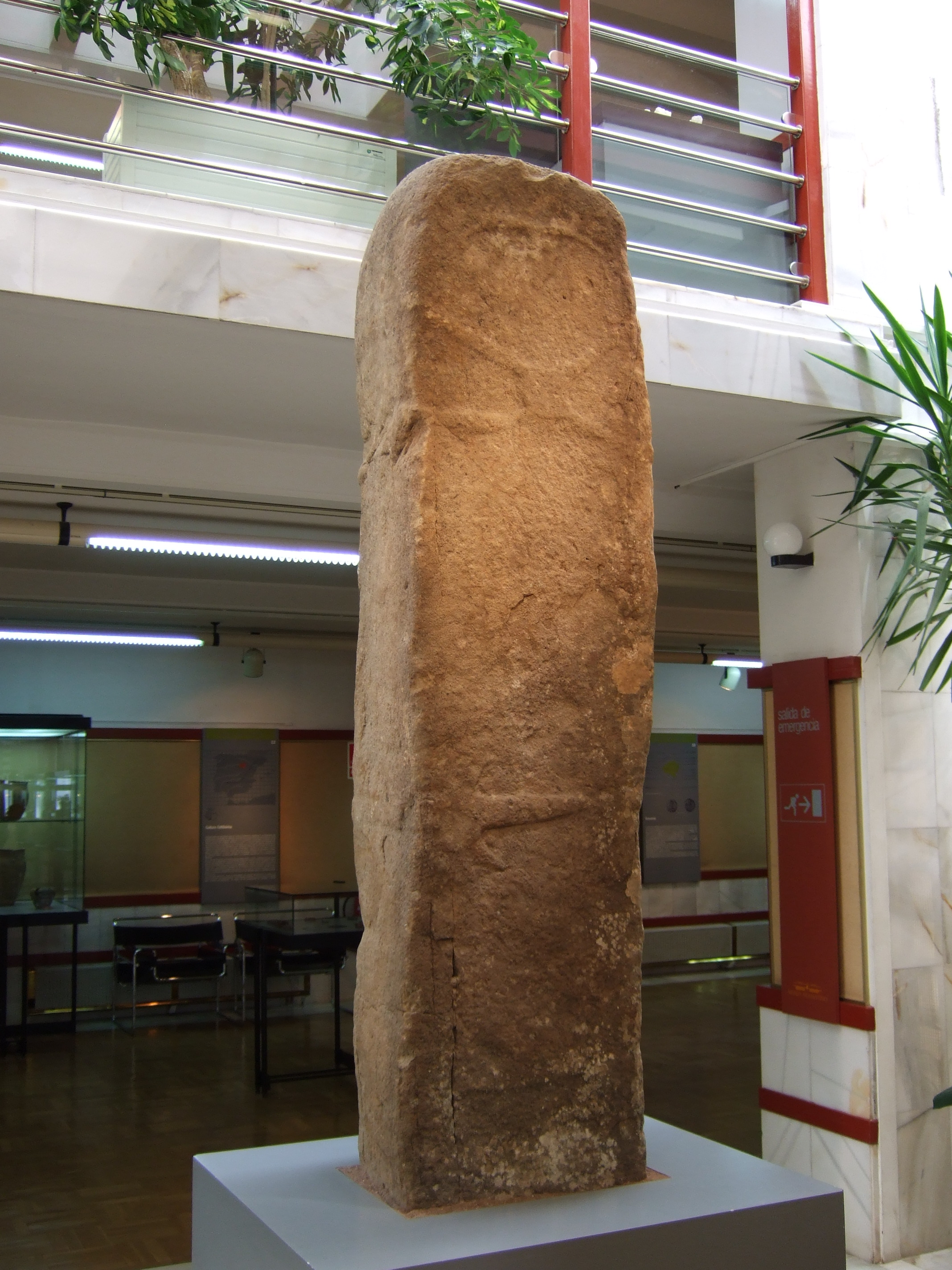 Estatua menhir; encontrada sin contexto en Villar del Ala; finales de la Edad del Bronce, posiblemente del 850 adC o posterior.